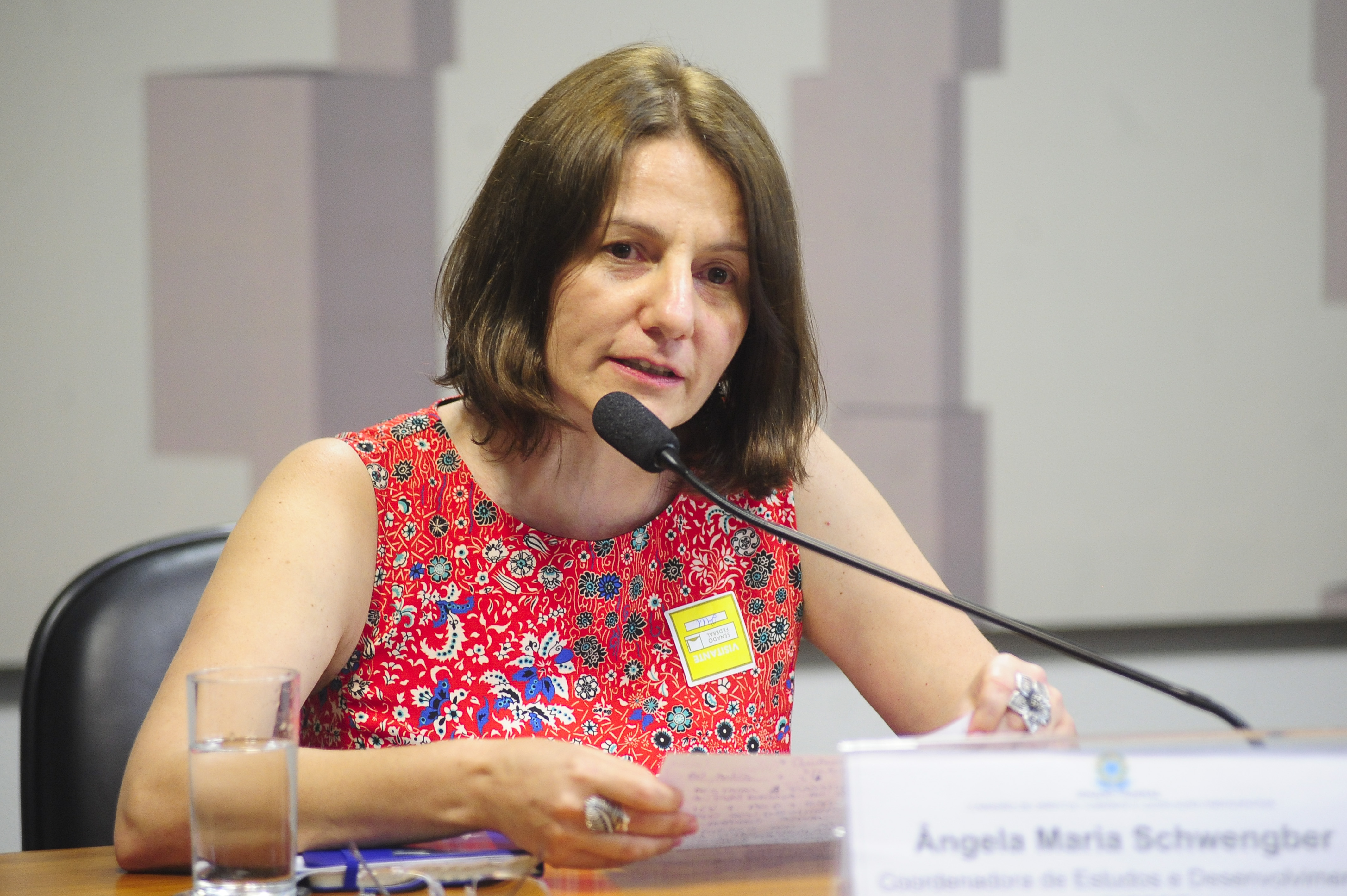 Comissão de Direitos Humanos e Legislação Participativa (CDH) realiza audiência pública interativa em homenagem aos 60 anos do Departamento Intersindical de Estatística e Estudos Socioeconômicos (Dieese). A homenagem foi proposta pelo senador Paulo Paim (PT-RS). Em pronunciamento, coordenadora de Estudos e Desenvolvimento do Dieese, Ângela Maria Schwengber Foto: Pedro França/Agência Senado